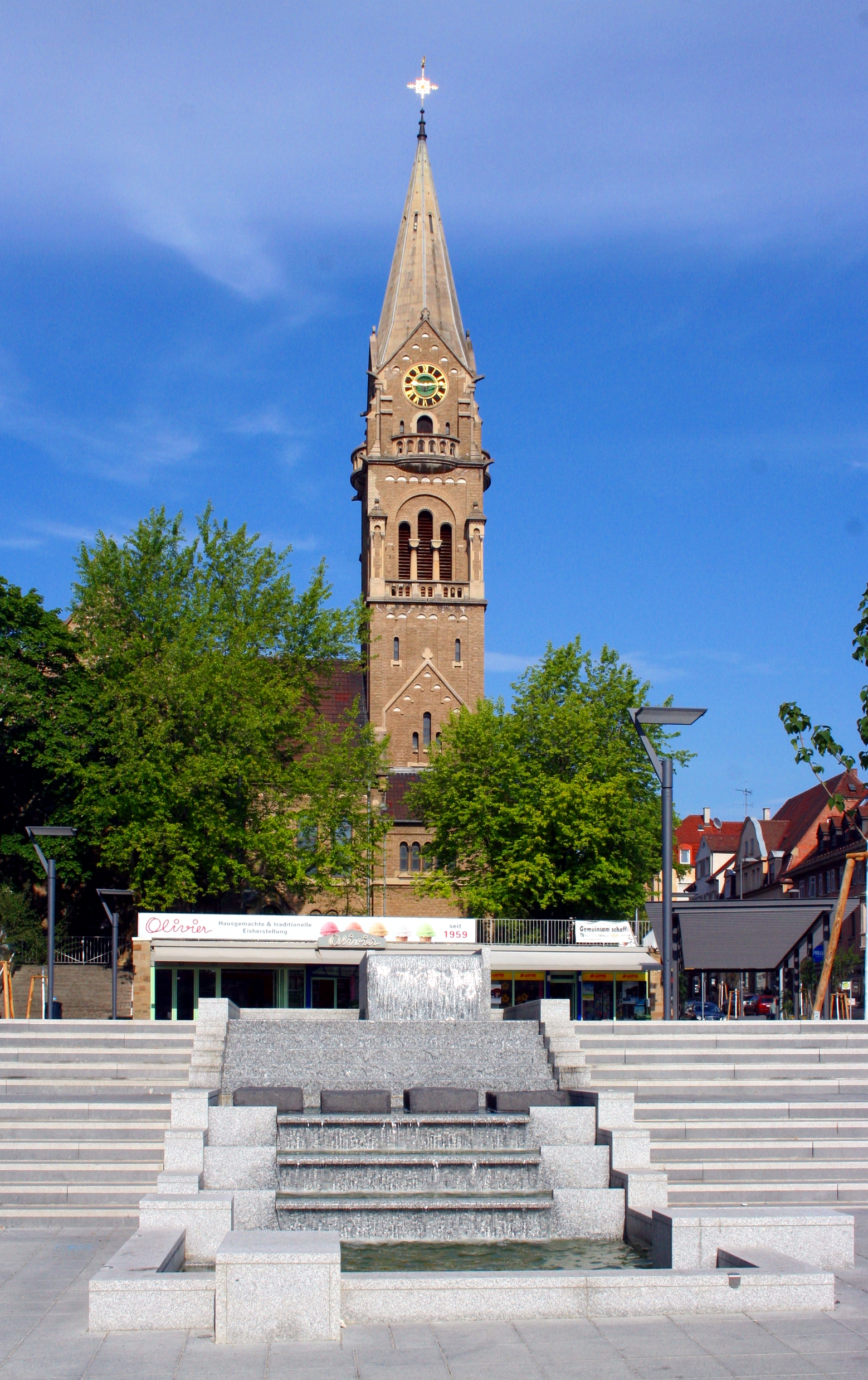 Evangelische Pauluskirche in der Unterländer Straße 15 in Stuttgart-Zuffenhausen. Gemäß Denkmalliste der Stadt Stuttgart von 2008 als Kulturdenkmal eingestuft.